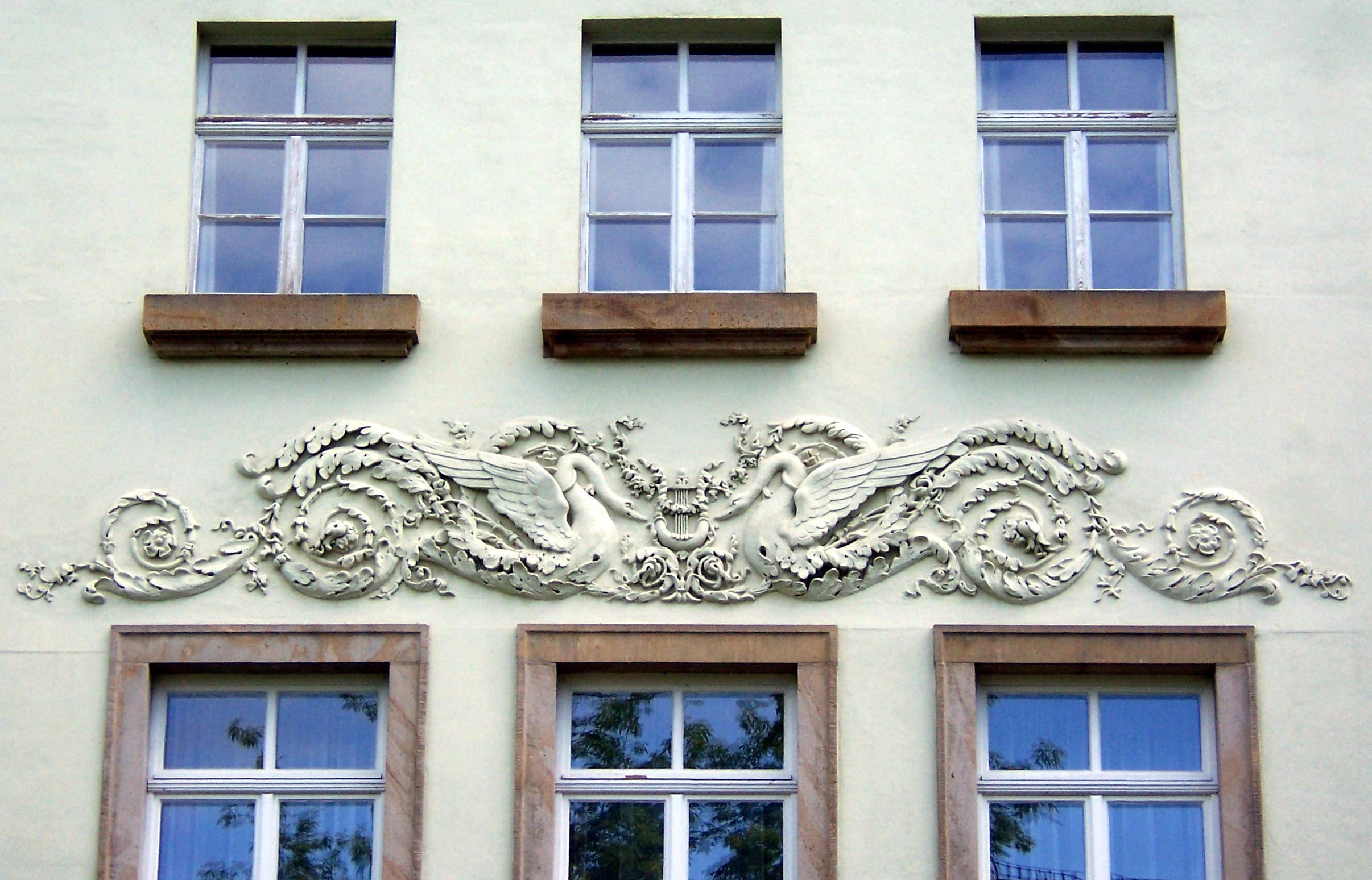 Detail des Schwanenhauses der Diakonissenanstalt in Dresden.